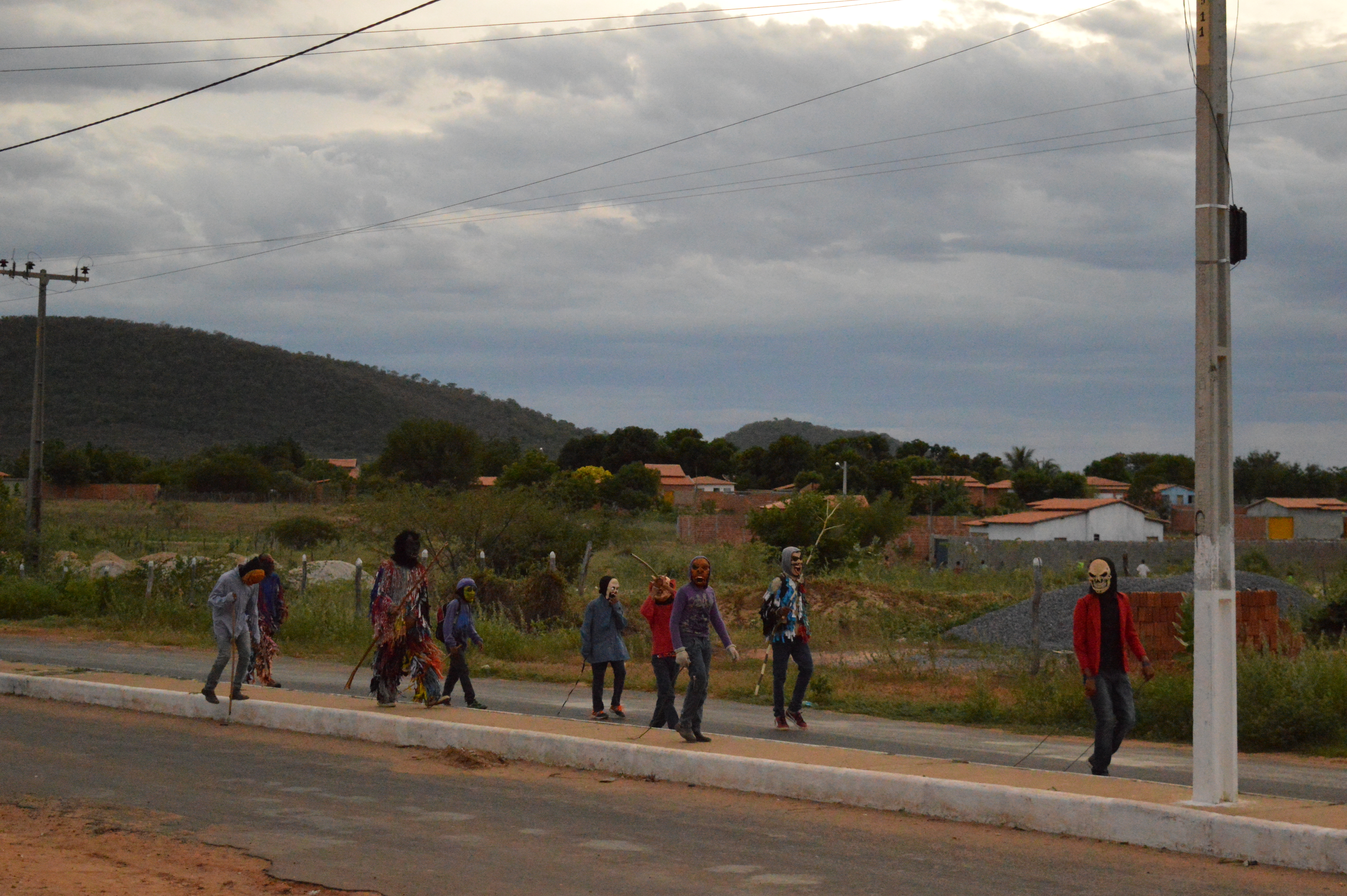 Caretagem do Divino, prática feita por adolescentes durante festa religiosa de Paratinga. Foto de 24 de janeiro de 2017.